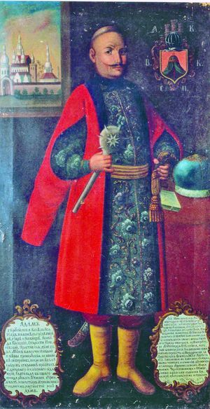 Ада́м з Брусилова Світольдич Кисі́ль-Низкиницький гербу Кисіль (Світольдич) (*1600, с. Низкиничі — †3 травня 1653, Низкиничі)